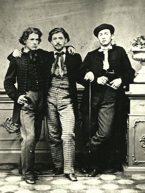 Jan Machytka (1844 - 1887) napravo stojící, Český architekt.